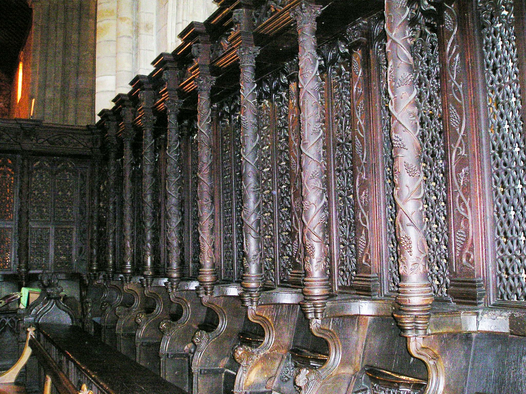 Cartmel, Cumbria, ehemalige Prioreikirche, Chorgestühl